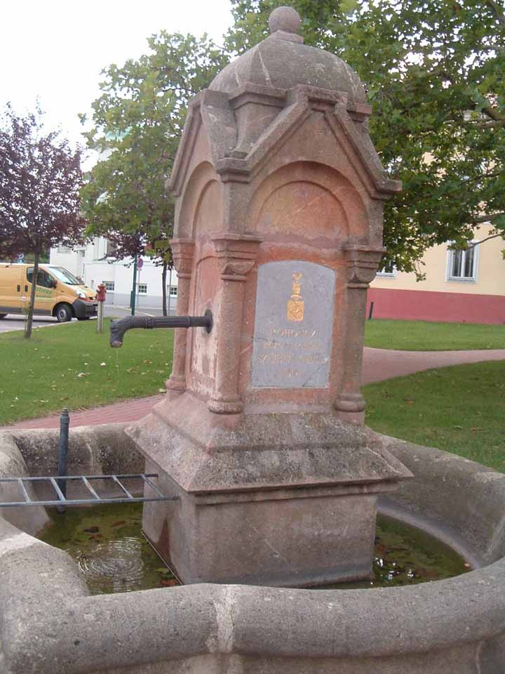 Old drinking-well in Rechnitz, Burgenland, Austria